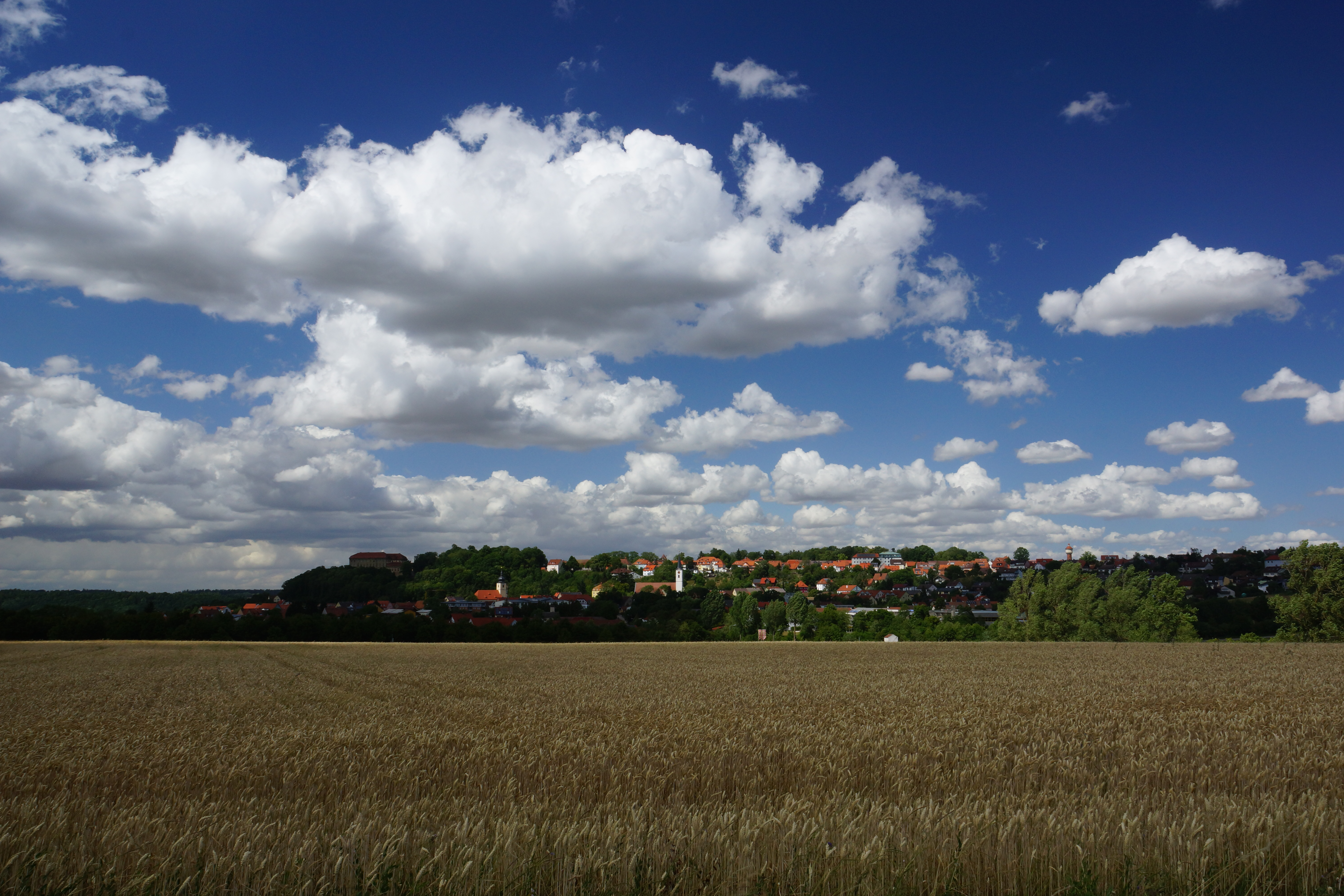 Schillingsfürst im Sommer 2015